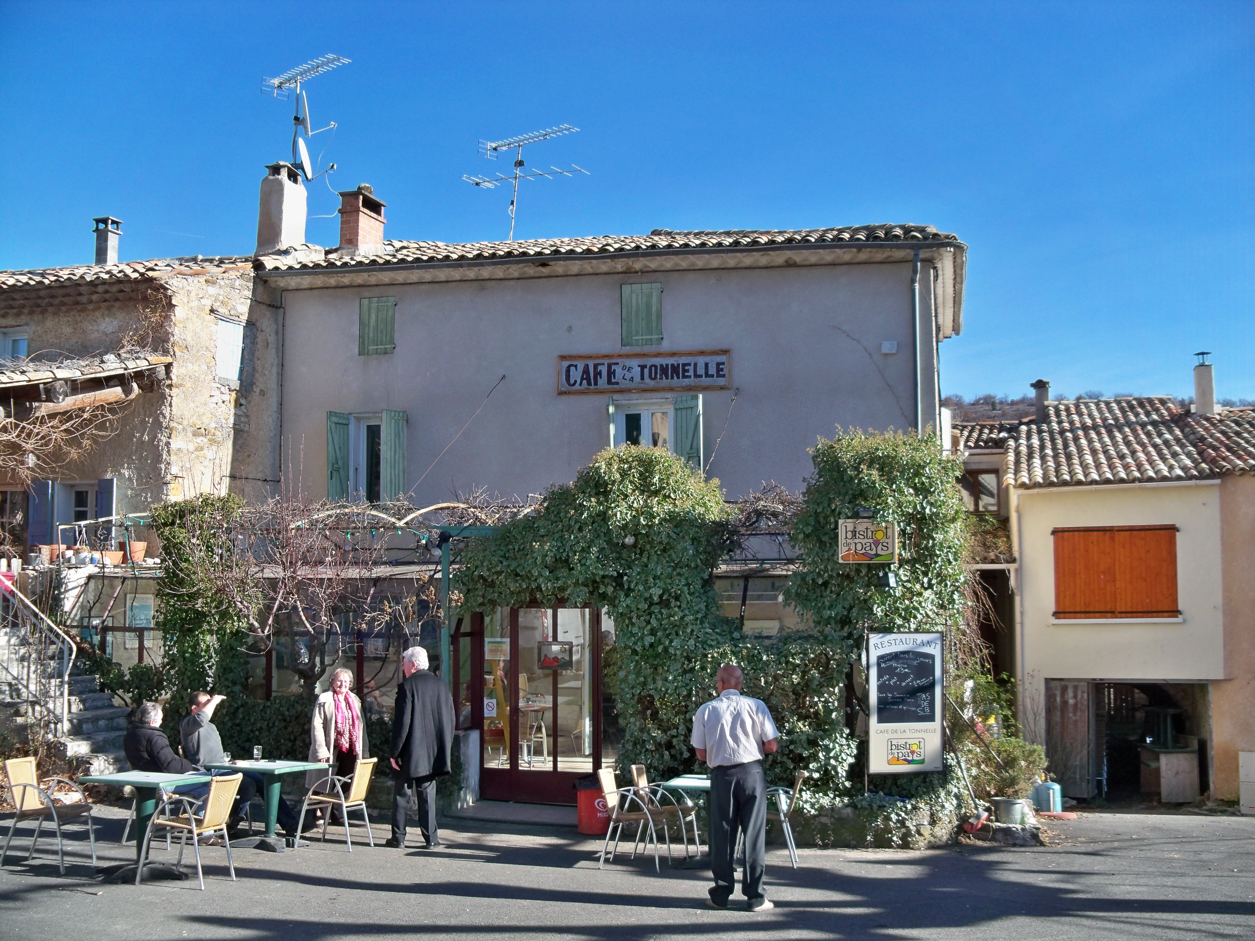 Bistrot de Pays à Ongles (04), France